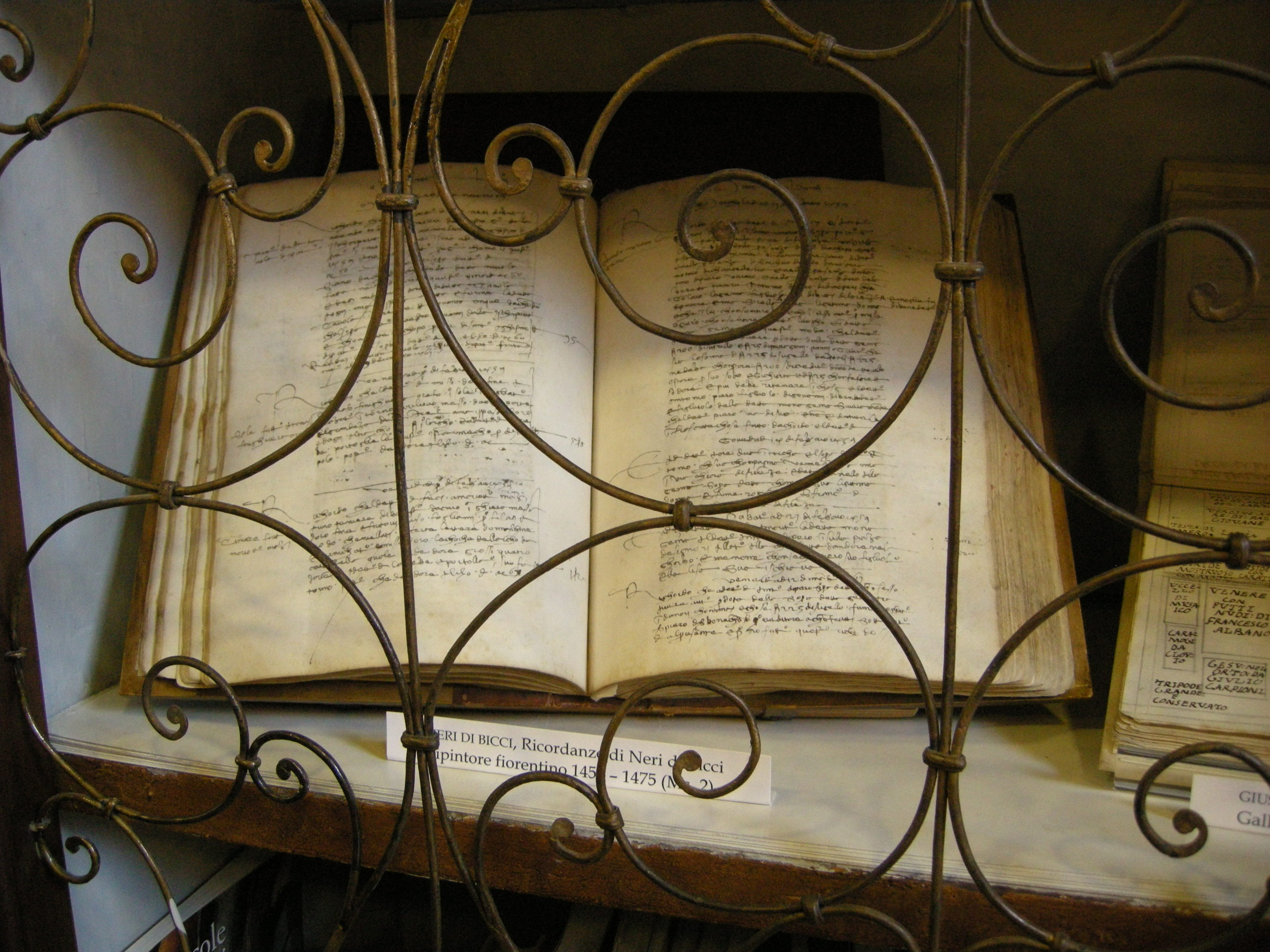 Biblioteca degli uffizi, libro delle ricordanze di neri di bicci